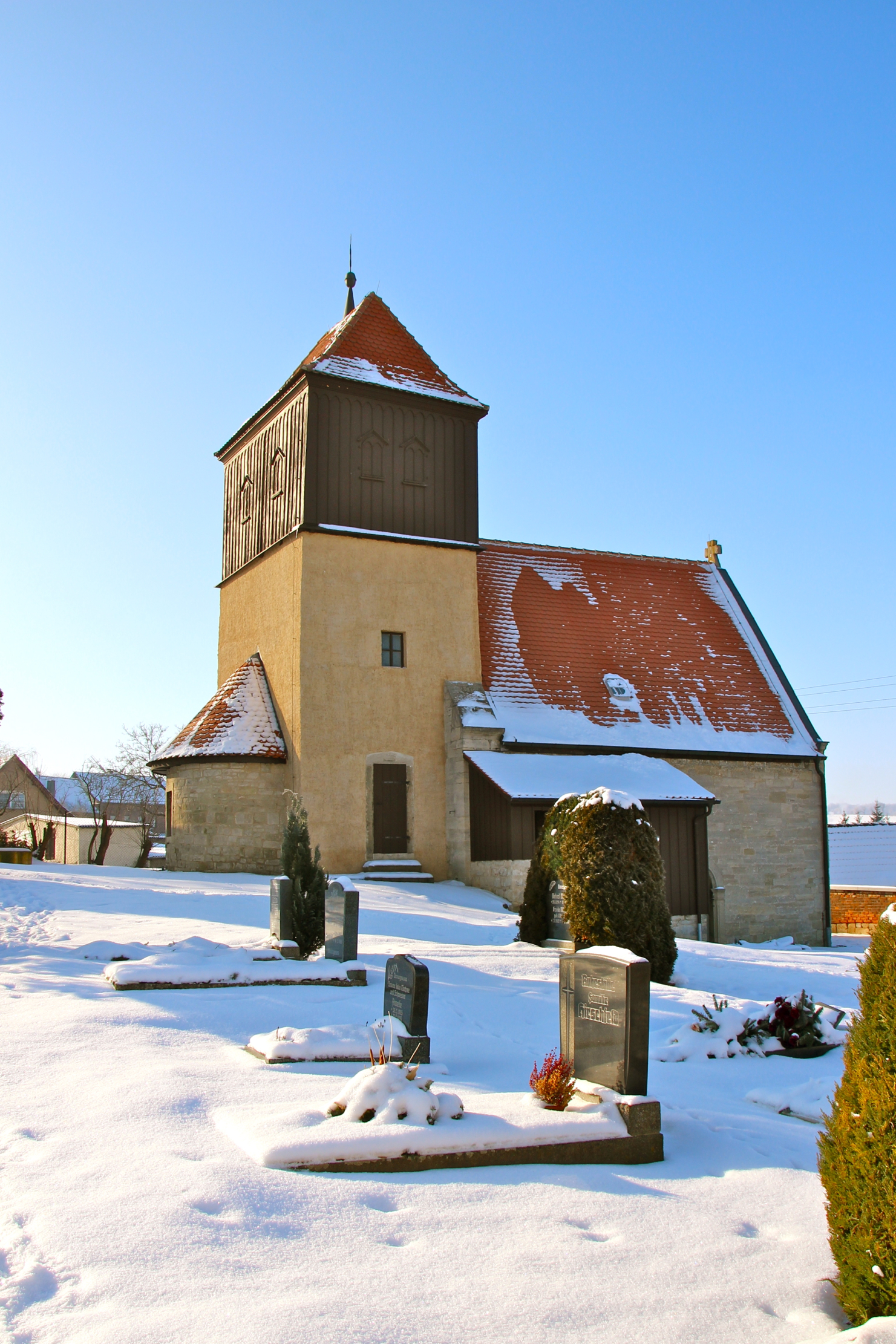 Niedermöllern ist ein Ortsteil der Gemeinde Lanitz-Hassel-Tal im Burgenlandkreis in Sachsen-Anhalt.